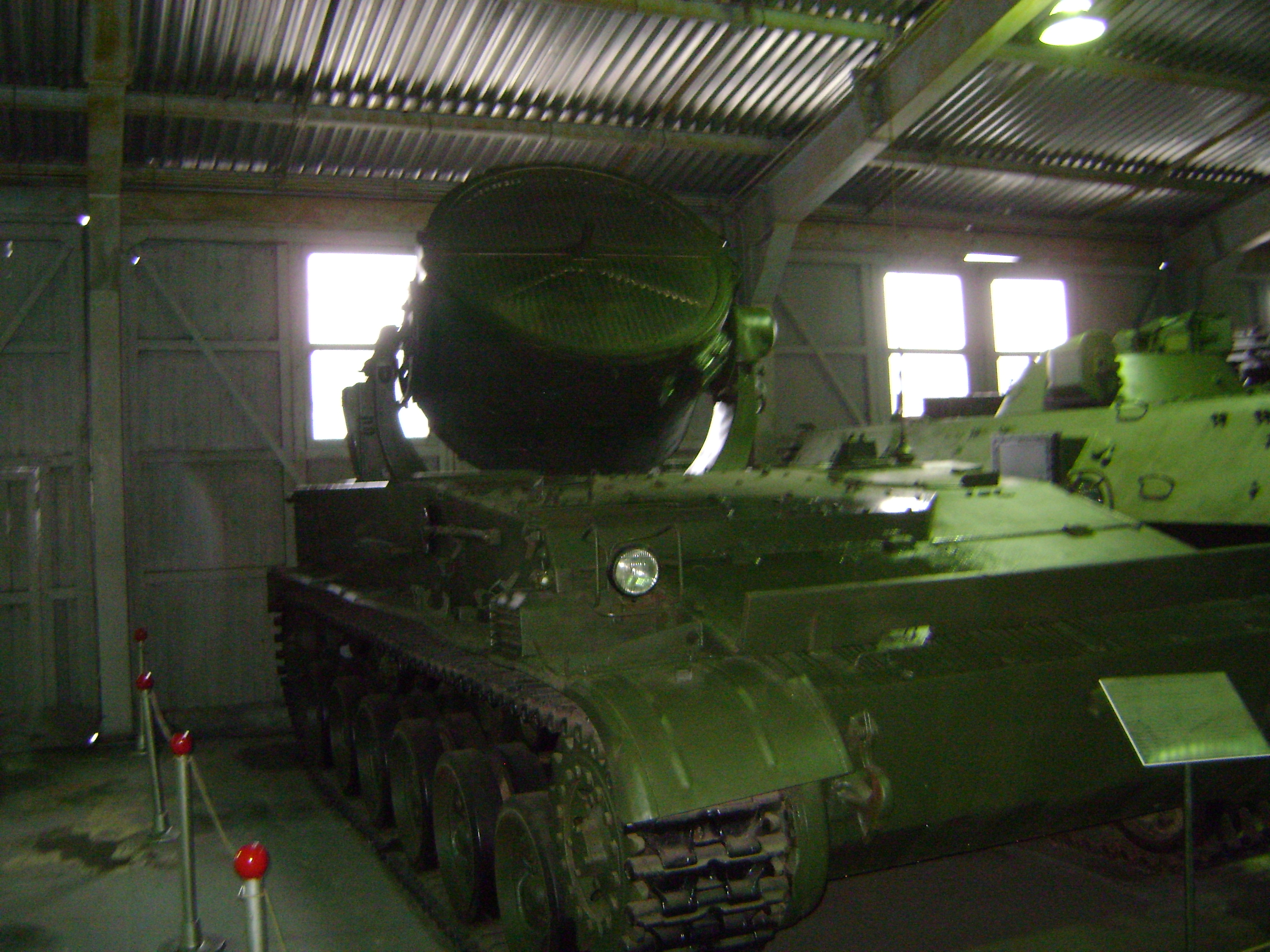 Tank Museum, Kubinka